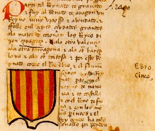 Página del Libro del conosçimiento de todos los rregnos et tierras e señoríos que son por el mundo et de las señales et armas que han. (Libro de viajes y armorial, en la página en que alude al paso por el Reino de Aragón y a la señal del rey de Aragón). Transcripción del texto de la imagen (según María Jesús Lacarra, María del Carmen Lacarra Ducay y Alberto Montaner, Libro del conosçimiento de todos los rregnos et tierras e señoríos que son por el mundo et de las señales et armas que han, Zaragoza, Institución "Fernando el Católico" (CSIC)-Excma. Diputación Provincial de Zaragoza, 1999): Parti del rreynado de Granada et fuy al rreñado de Aragon, vn rreyno muy vjciosso et abondado. Et ffalle en el çinco çivdades grandes: a la major, do coronan los rreyes, dizen Çaragoça, a la otra, Valençia, a la otra, Tarragona et a la otra, Barçalona et a la otra, Tortosa. Et por este rreynado corre el rrio Ebro et el Flumen Sçinca. Et este rreynado parte con el rreyno de Navarra et con Castilla et con el rreño de Francia et con los montes Perineos. Et el rrey dende ha tales senalles por pendon